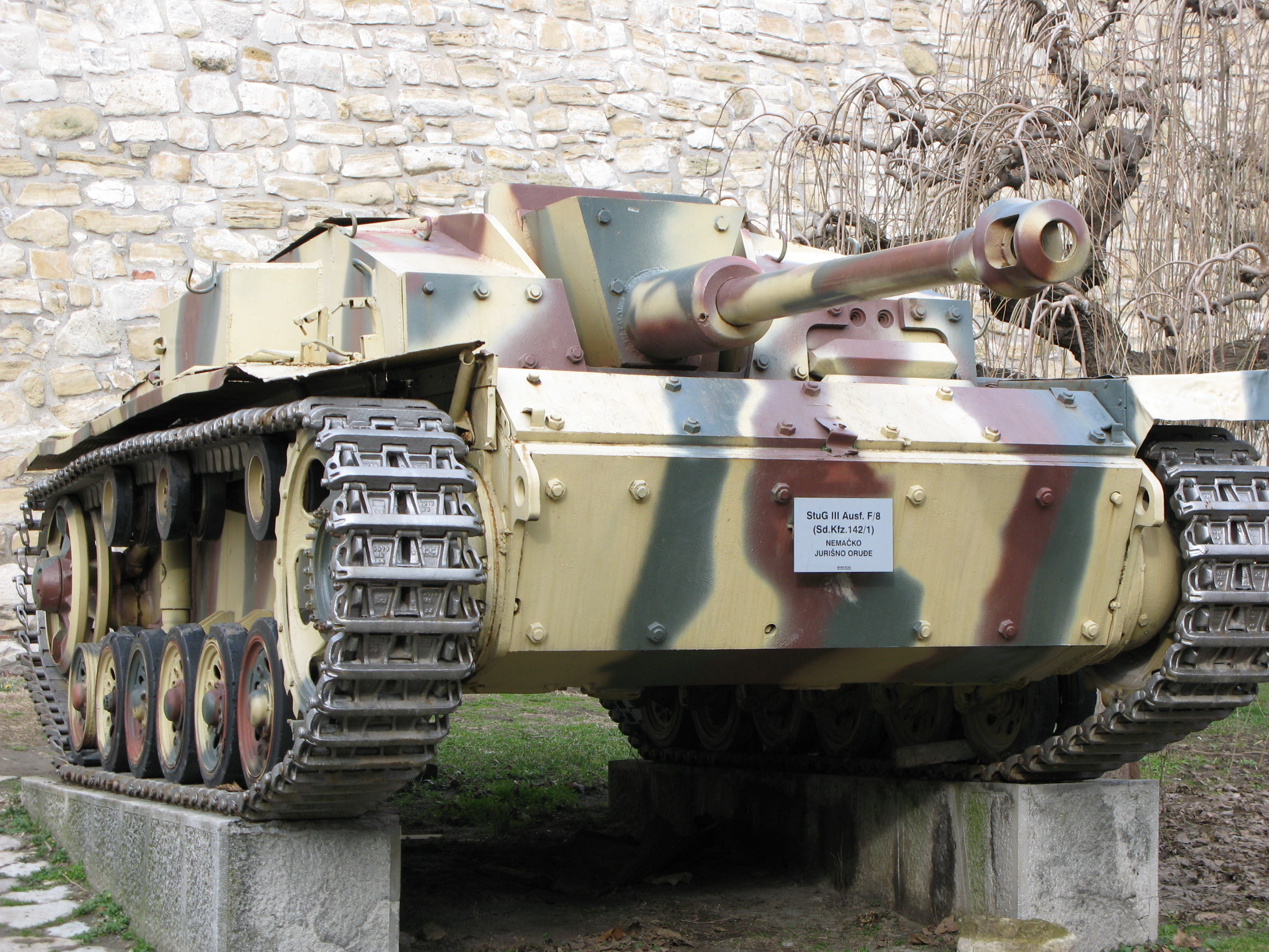 Stug III.